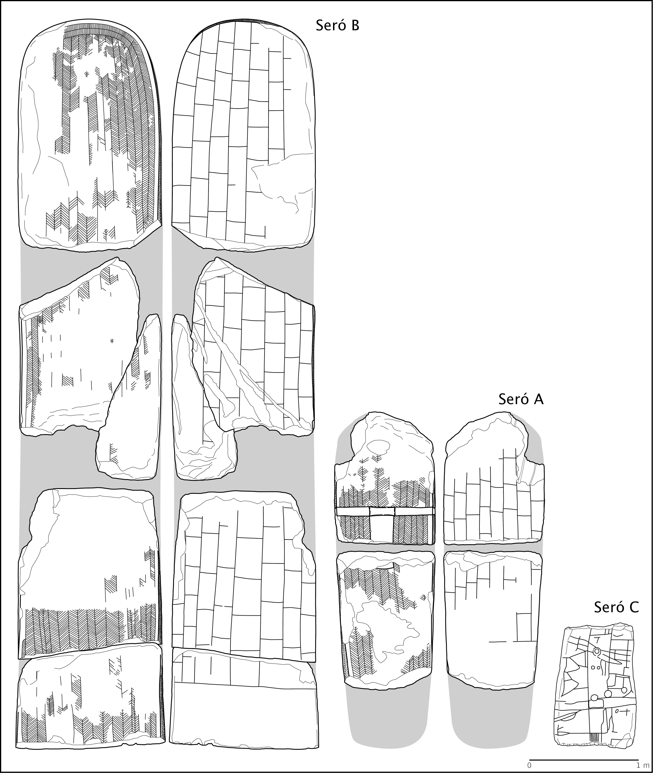 Dibuixos dels frontals i els dorsos de les estàtues-menhirs de Seró, reutilitzades en la construcció del megàlit dels Reguers de Seró